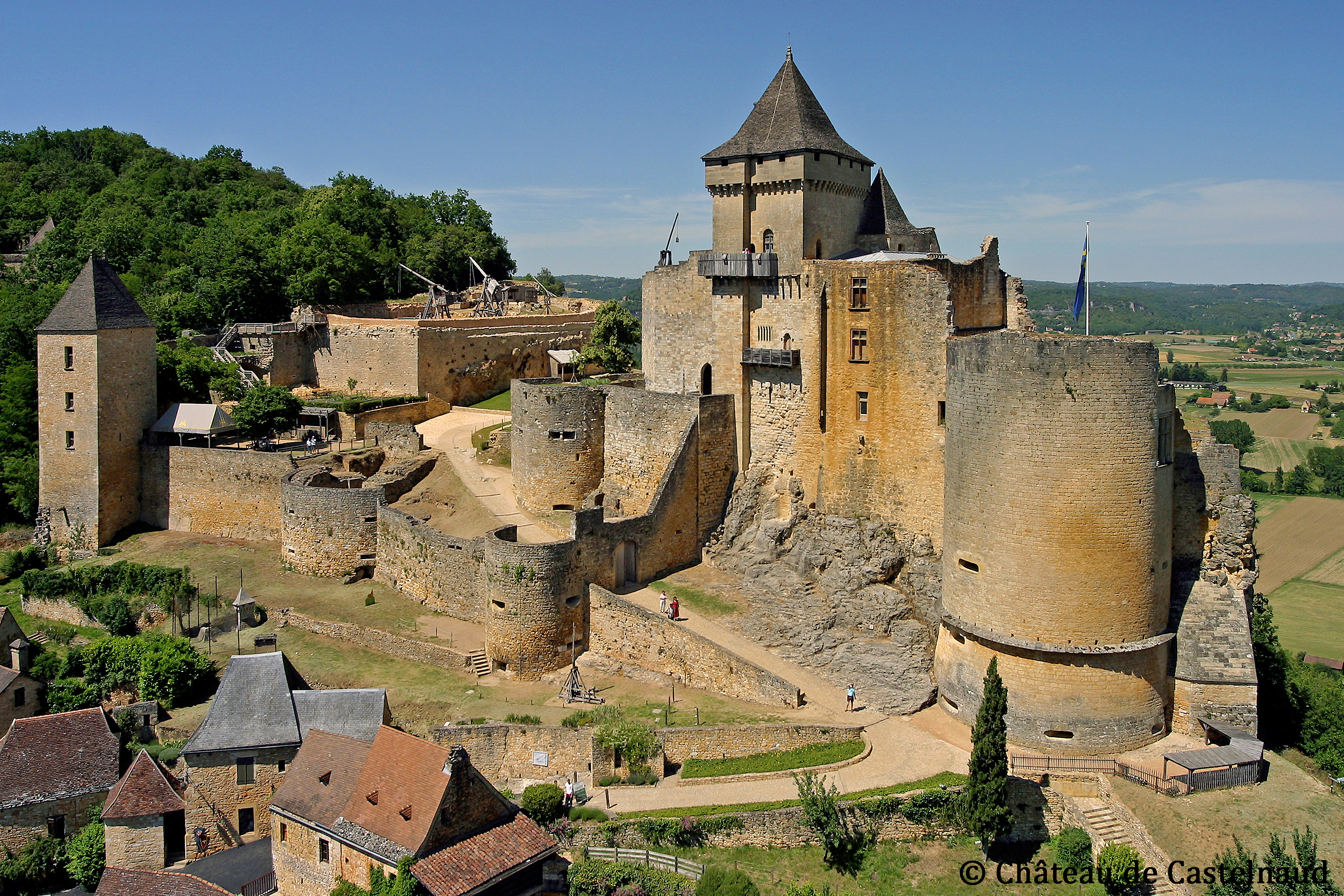 Vue d'ensemble du château de Castelnaud